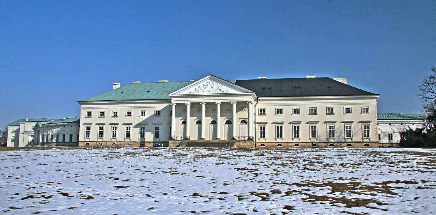 Hlavní budova zámku Kačina při pohledu z parku.